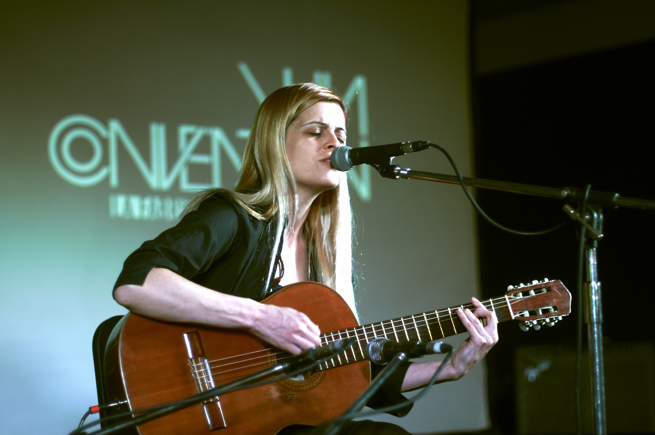 Laura Ros en un recital en Buenos Aires, el 2 de junio de 2011